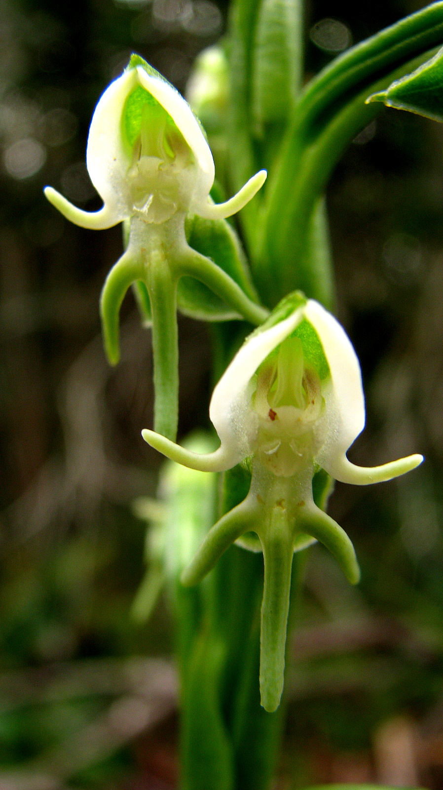 Habenaria rodeiensis Barb.Rodr.